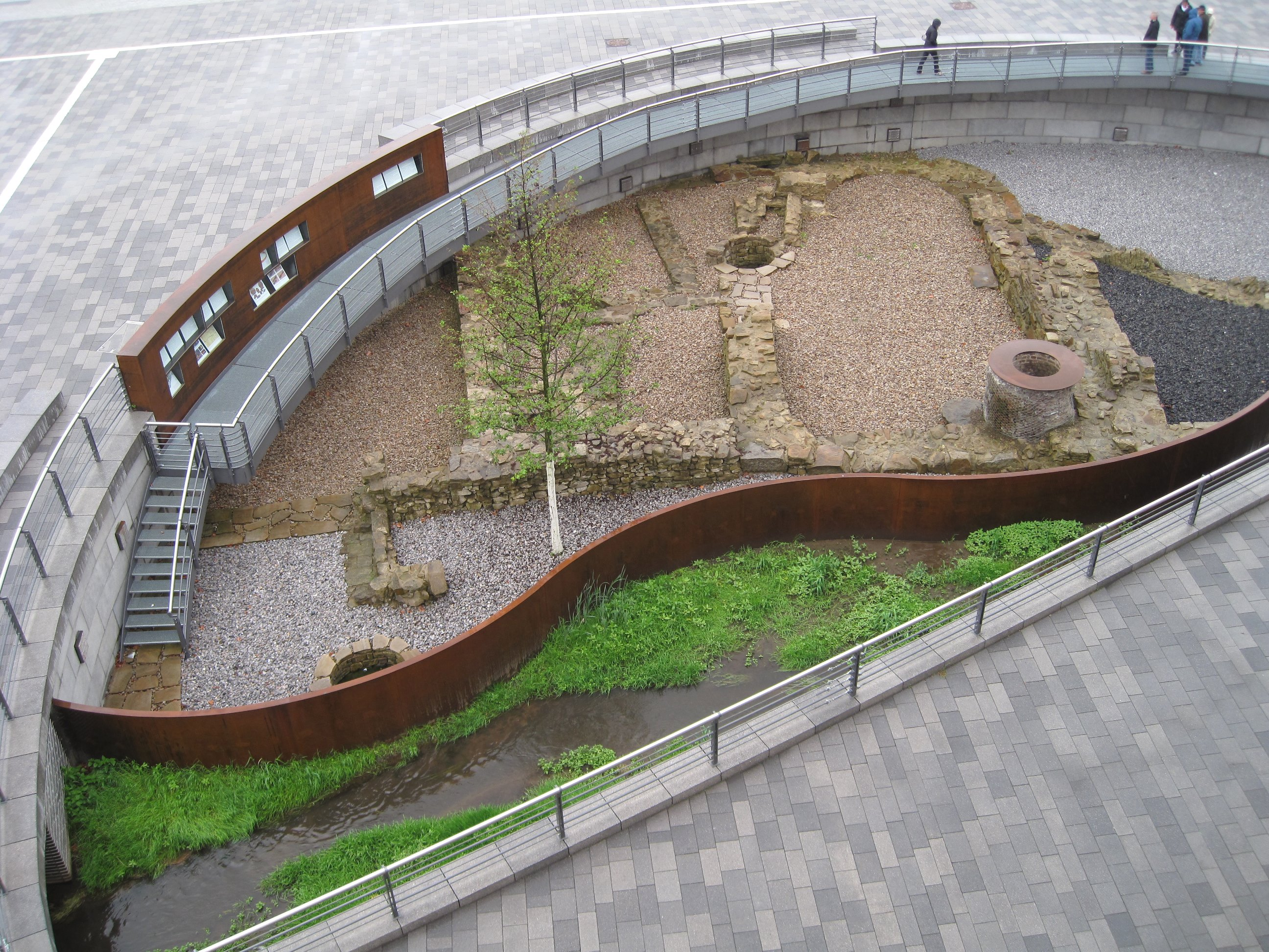 Archäologische Ausgrabungen nahe der Hörder Burg in Dortmund-Hörde, Hörder Burgstraße 18.